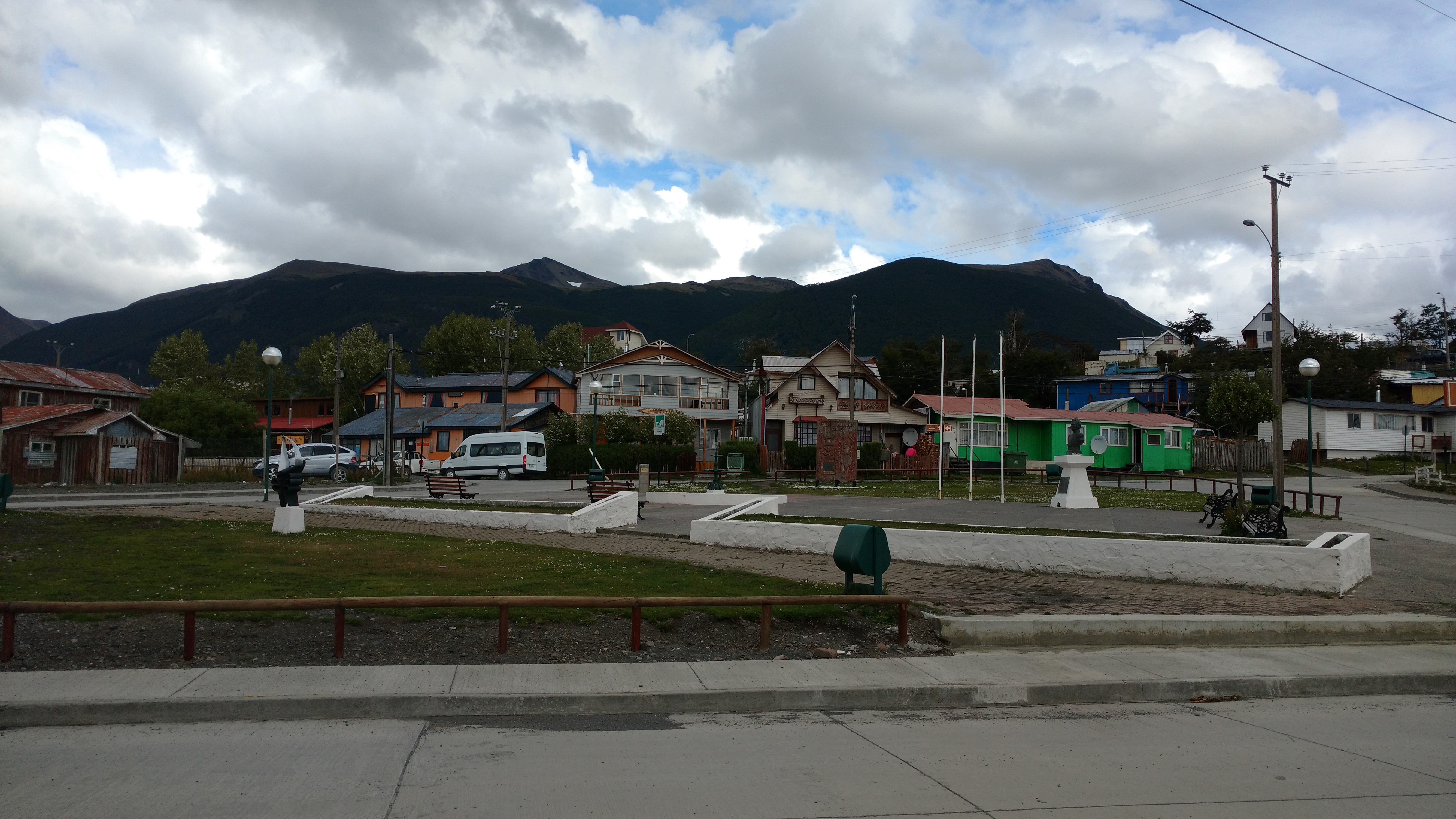 Plaza O'Higgins en Puerto Williams, Comuna de Cabo de Hornos, Chile